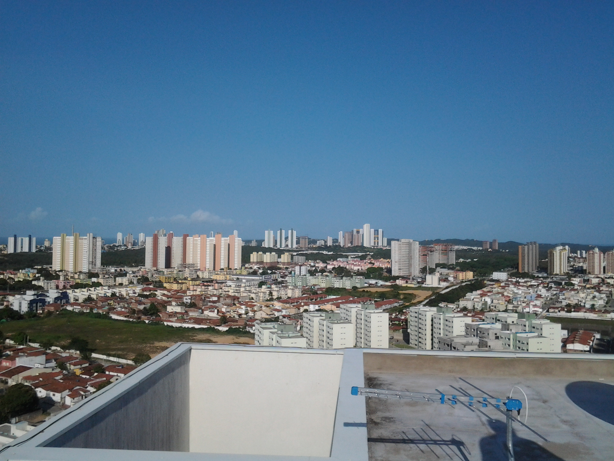 Bairro Nova Parnamirim. Parnamirim, Rio Grande do Norte, Brasil.